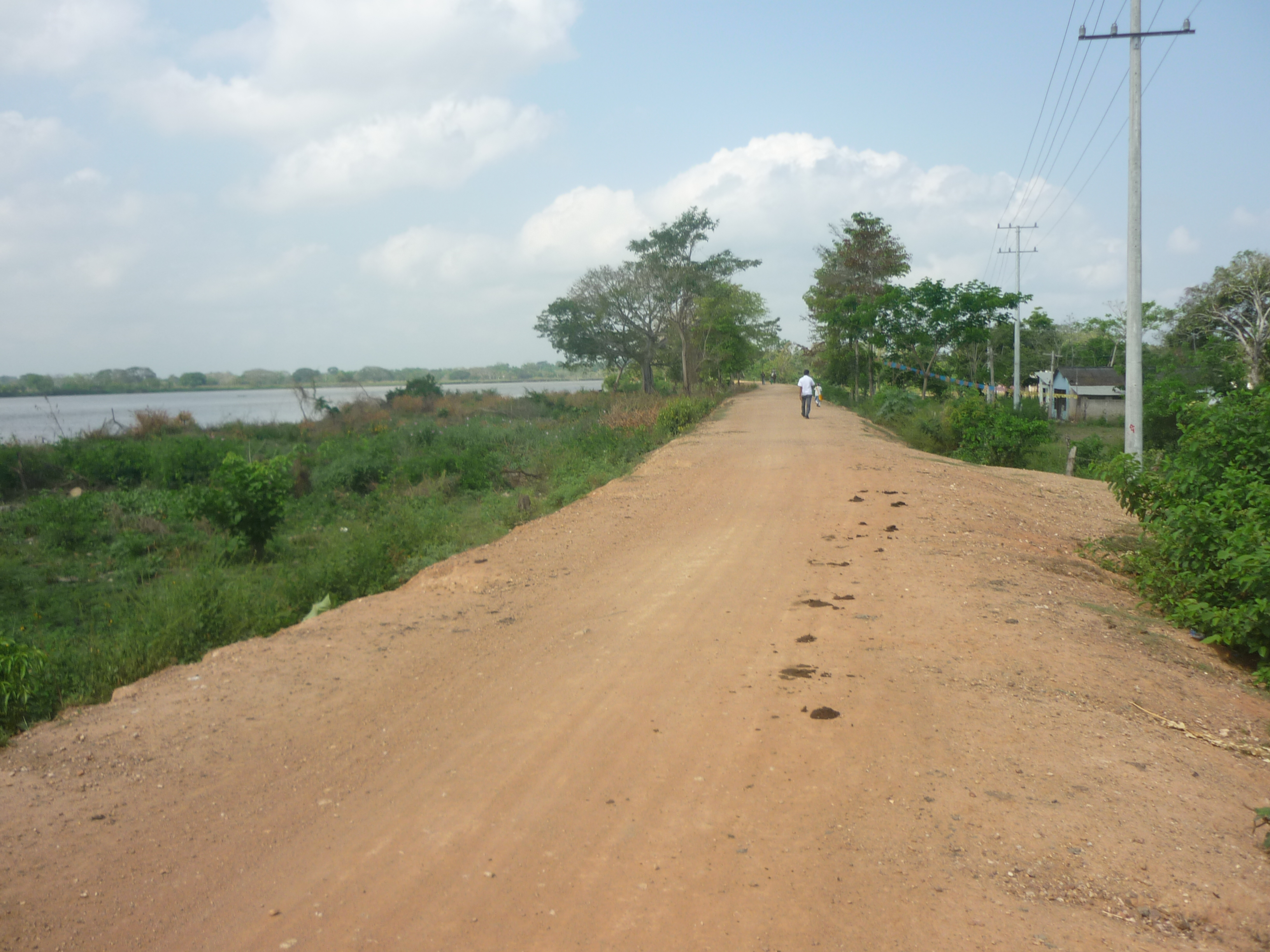 Ubicación: HATILLO DE LOBA, BOLÍVAR